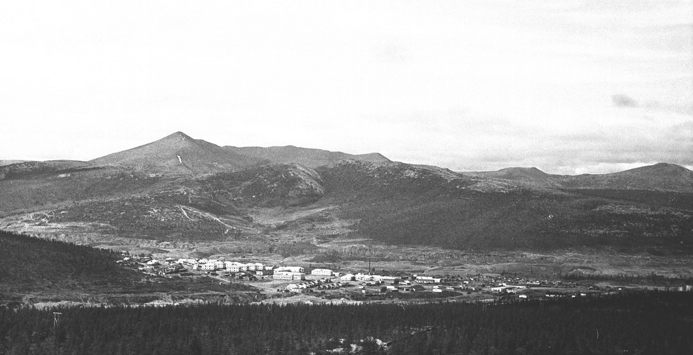 посёлок Весенний, Чукотка